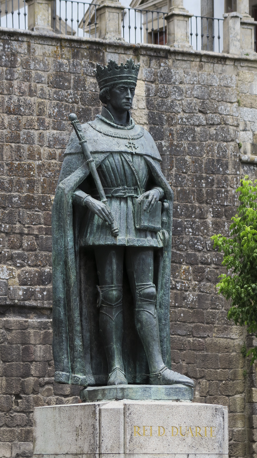 Álvaro de Brée, Estátua de D. Duarte, Viseu